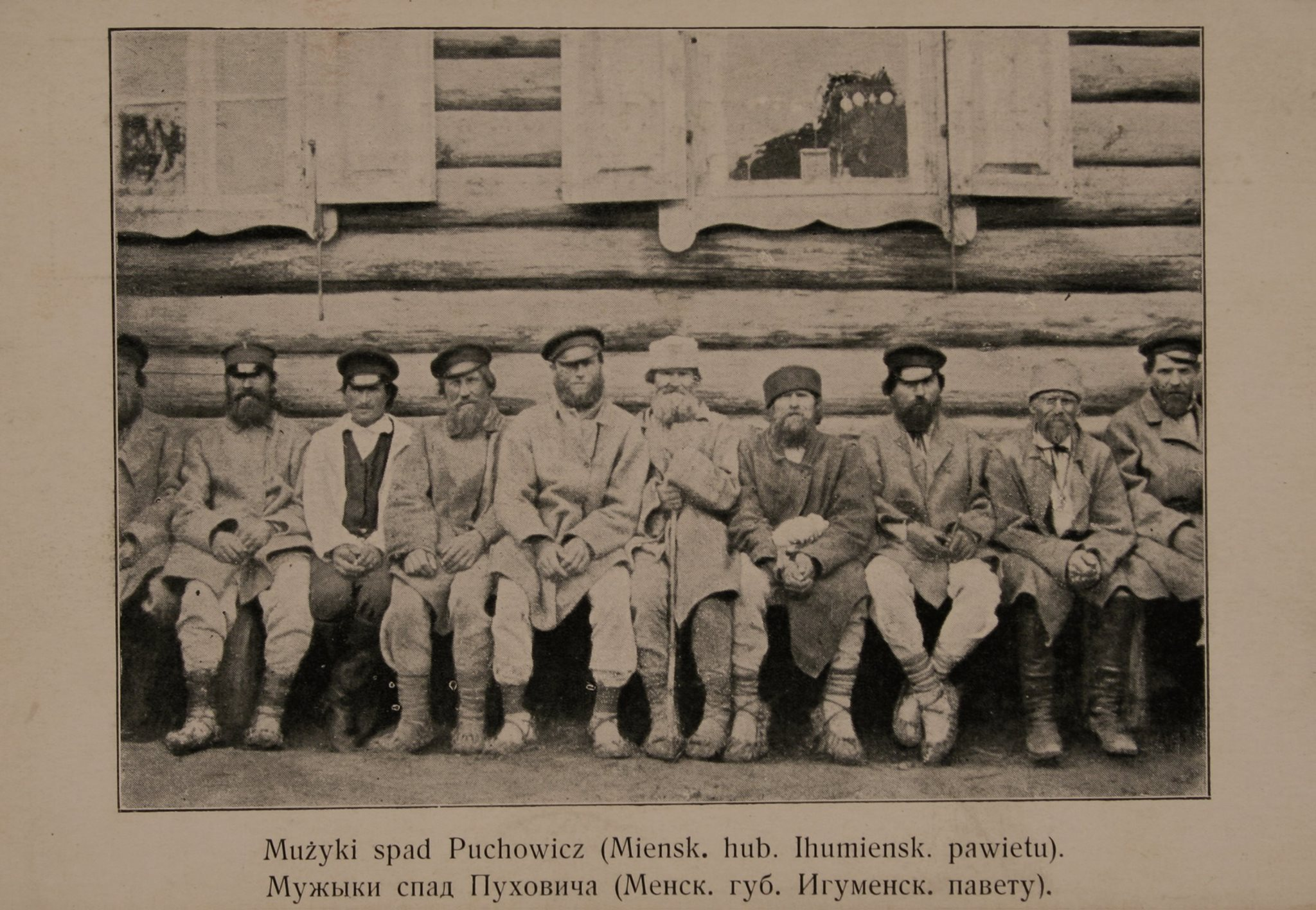 Беларуская (тарашкевіца): Мужыкі з-пад Пухавічаў (Puchavičy)